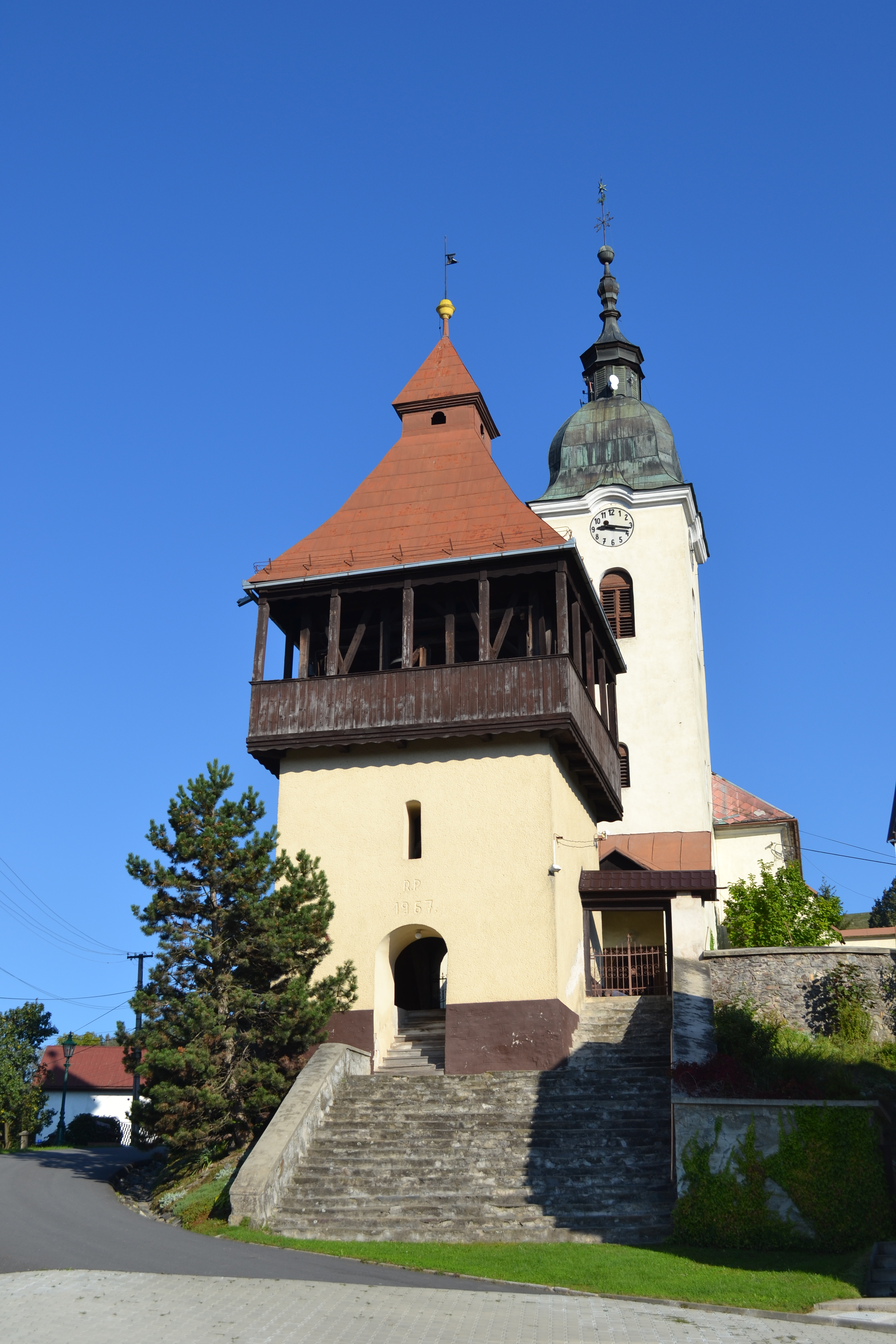 Evanjelický kostol (kultúrna pamiatka) a zvonica v Klenovci